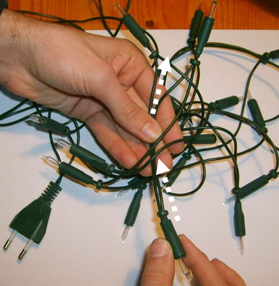 toelichting bij richtlijn om kerstboomverlichtingsnoer te ontknopen